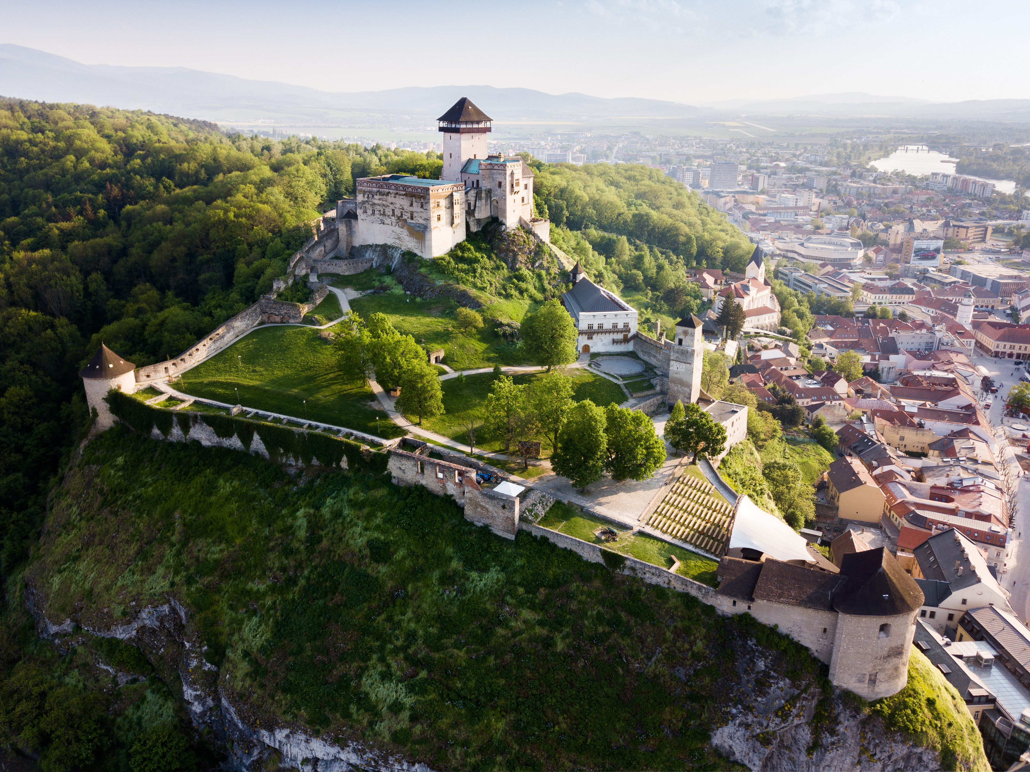 Trenčiansky hrad je správe Trenčianskeho Samosprávneho Kraja.